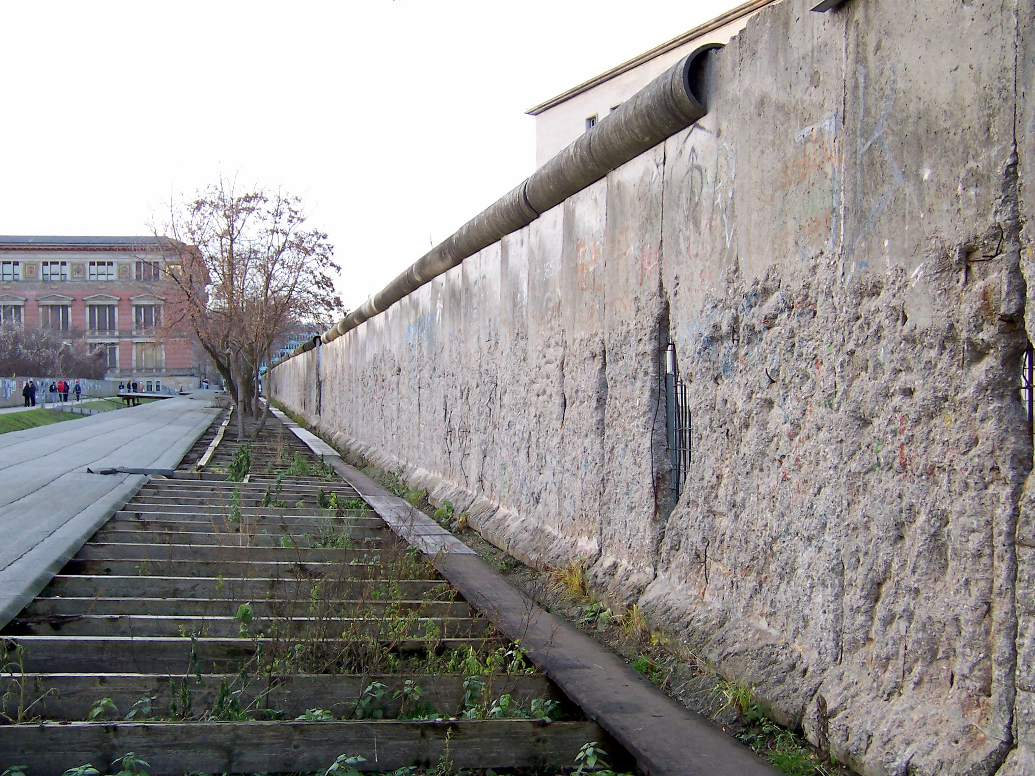 Berliner Mauerreste neben dem Prinz-Albrecht-Palais an der Niederkirchnerstraße.